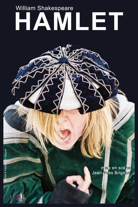 affiche du spectacle Hamlet de la compagnie le cubitus